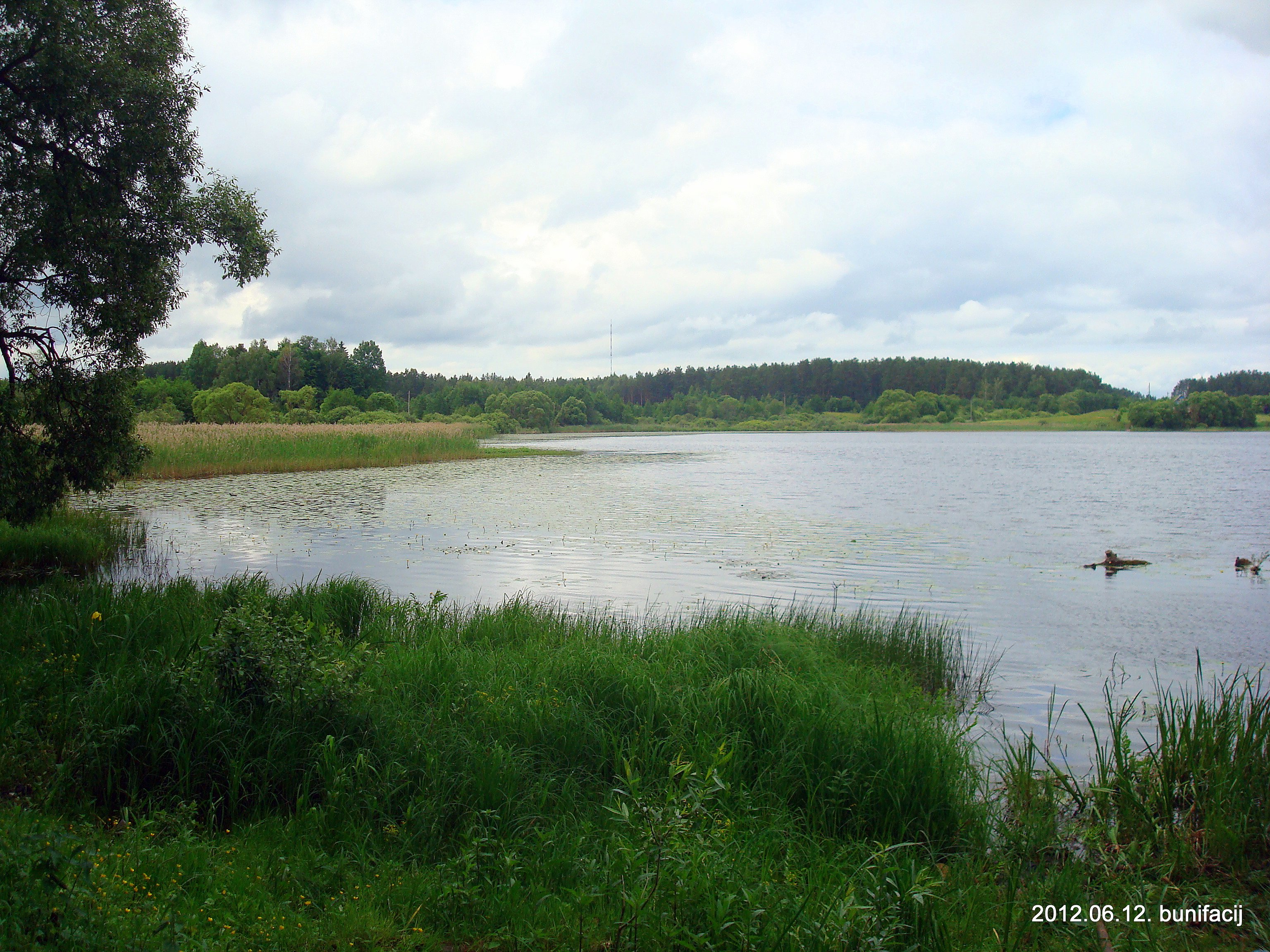 Возера Арэхаўна. Ушацкій раён Віцебскай вобласці Беларуси.